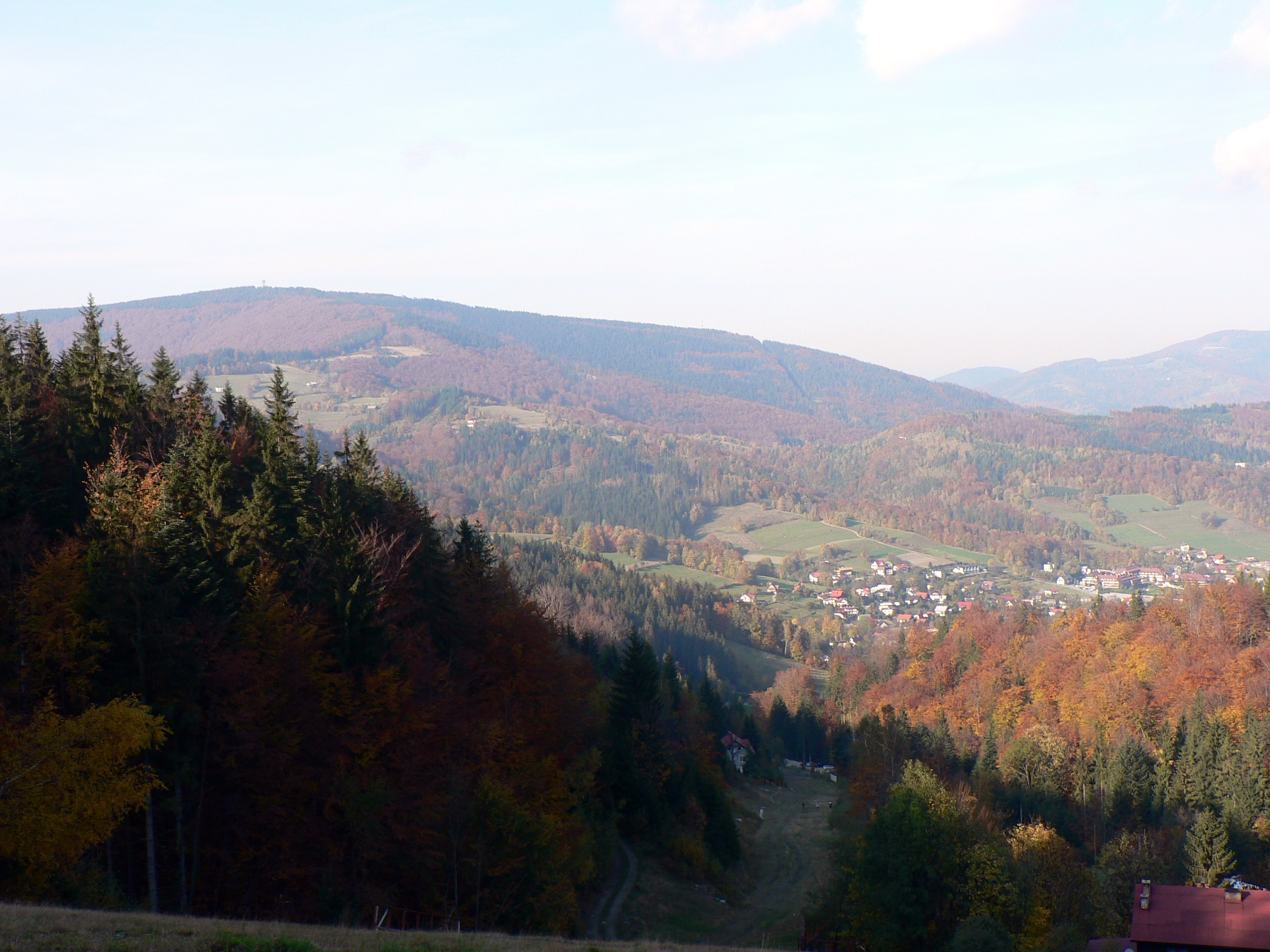 Wielka Czantoria i Wisła-Jawornik